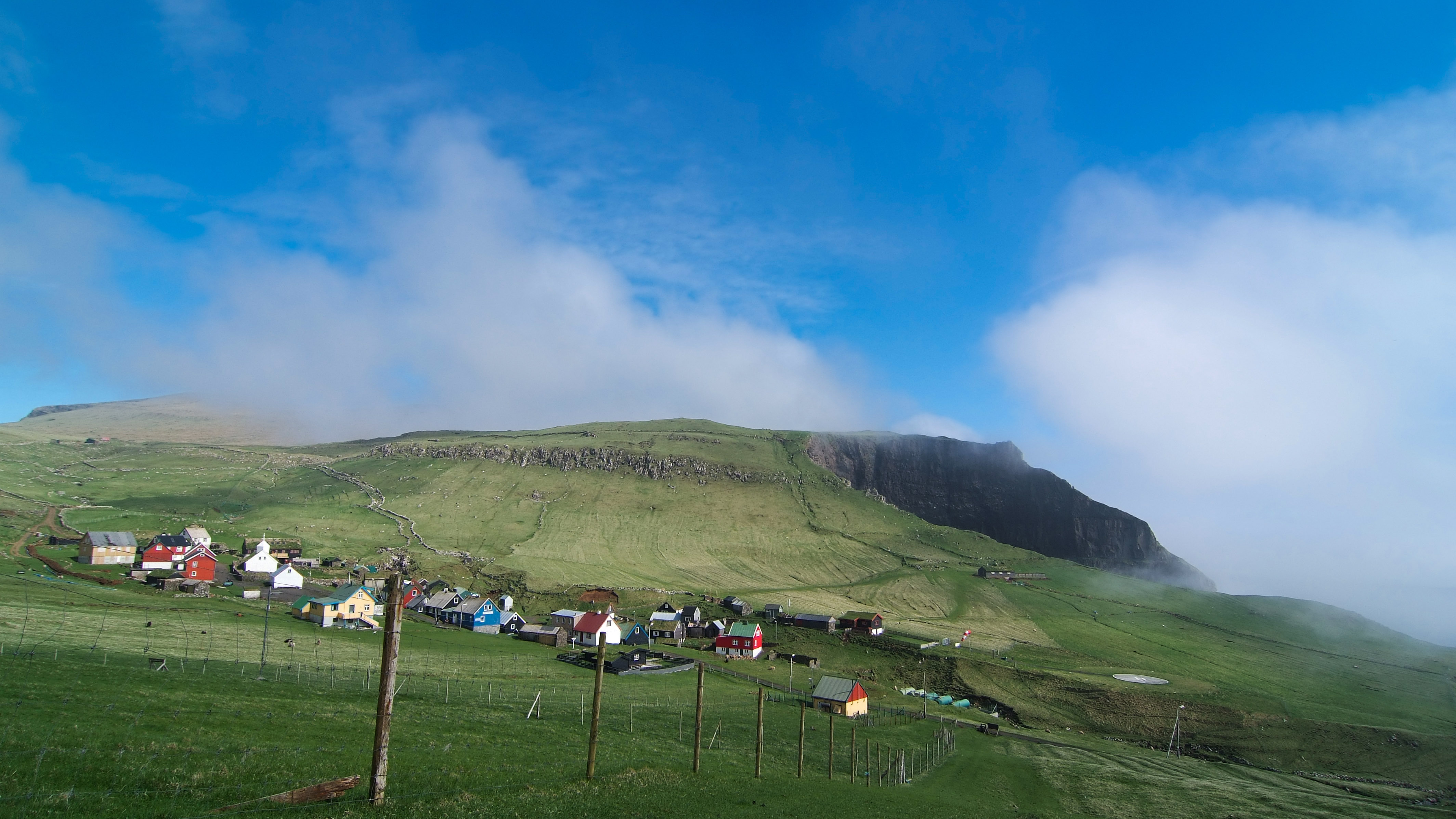 Mykines